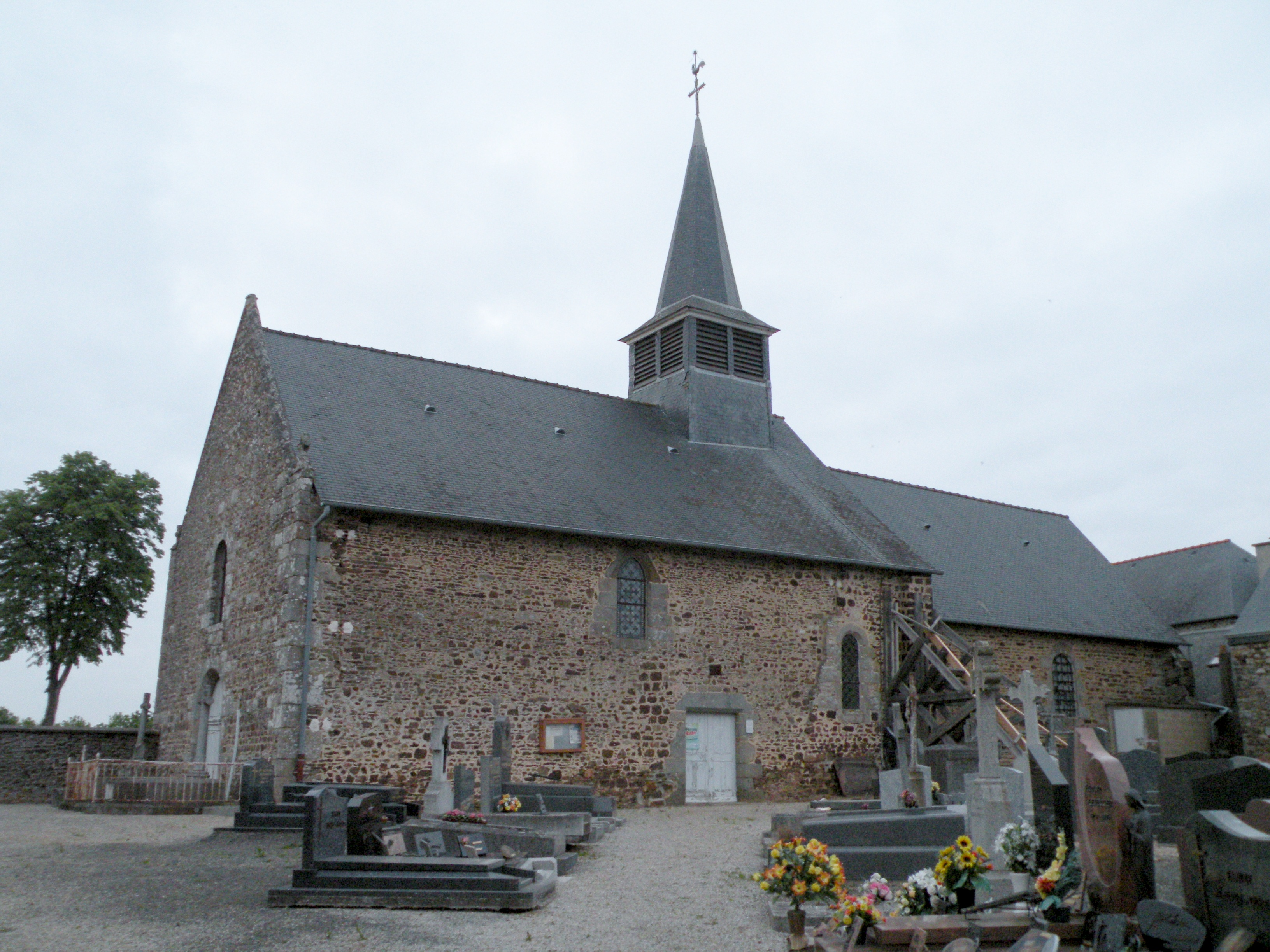 Église Notre-Dame d’Aubigné.